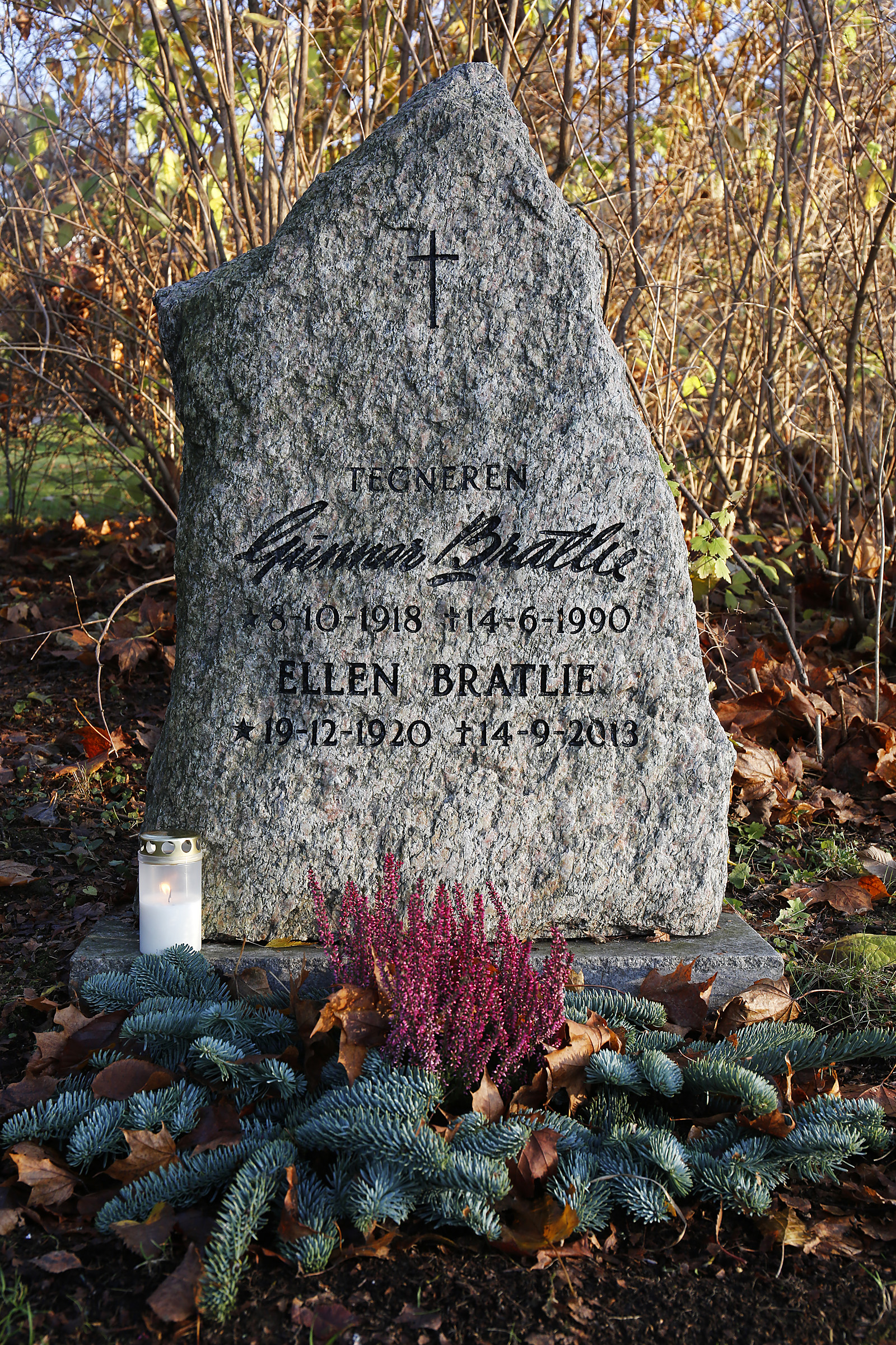 Gunnar Bratlie ligger gravlagt på Leie gravlund i Fredrikstad. Foto: Espen Bratlie.